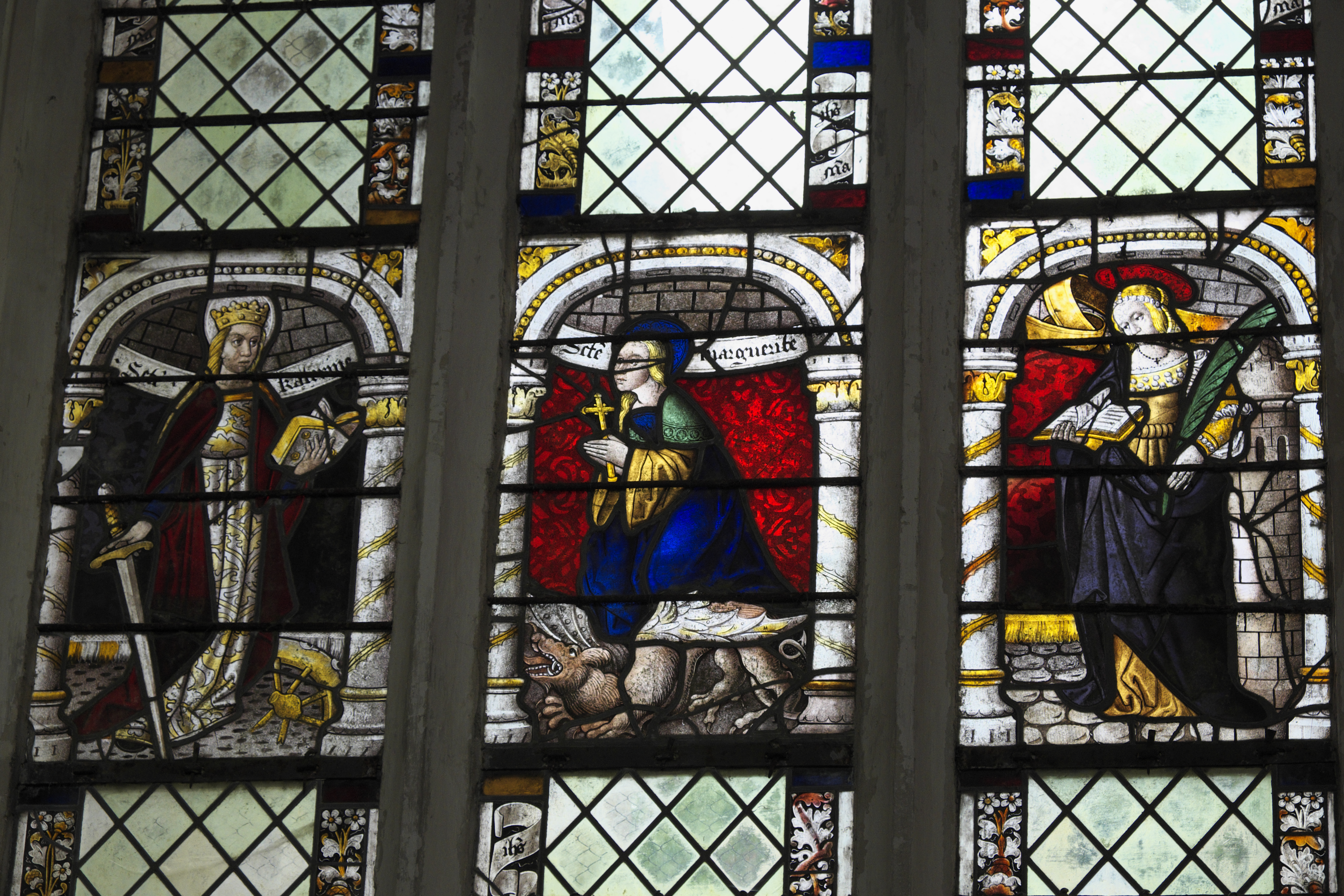 Katholische Kirche Notre-Dame-en-sa-Nativité in Puellemontier im Département Haute-Marne (Champagne-Ardenne/Frankreich), Bleiglasfenster aus dem ersten Viertel des 16. Jahrhunderts; Darstellung: Hl. Katharina, hl. Margareta, hl. Barbara .